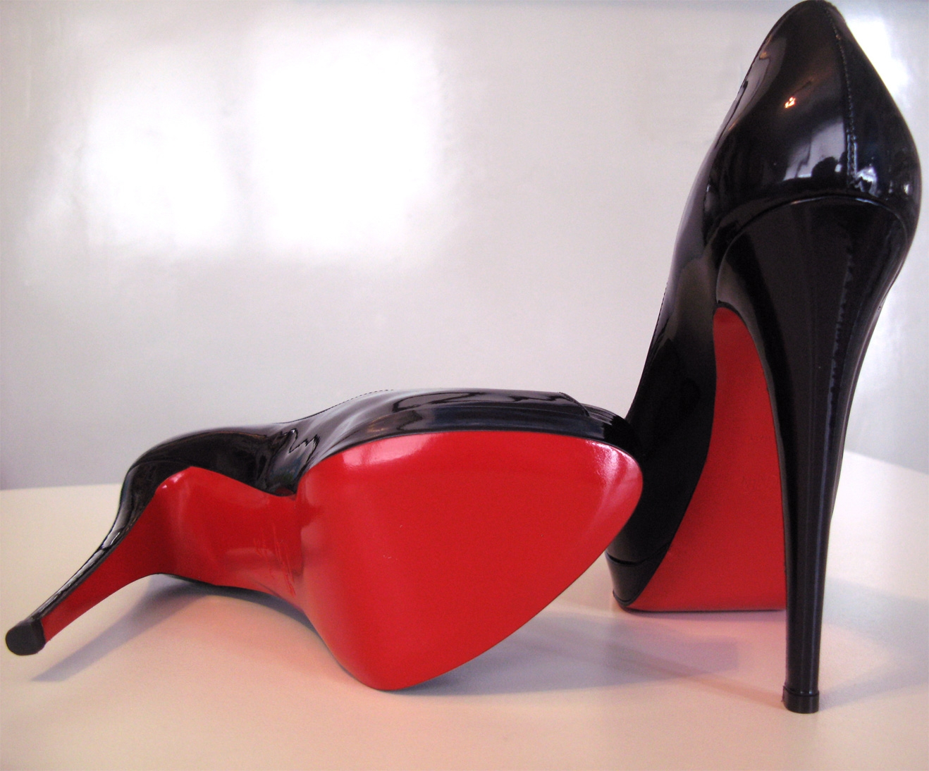 escarpin "peep toe" Christian Louboutin en cuir métallisé verni, talon de 140mm, modèle "Altadama" (semelle rouge)